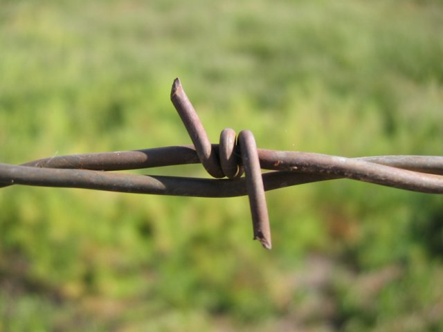 Barbed Wire